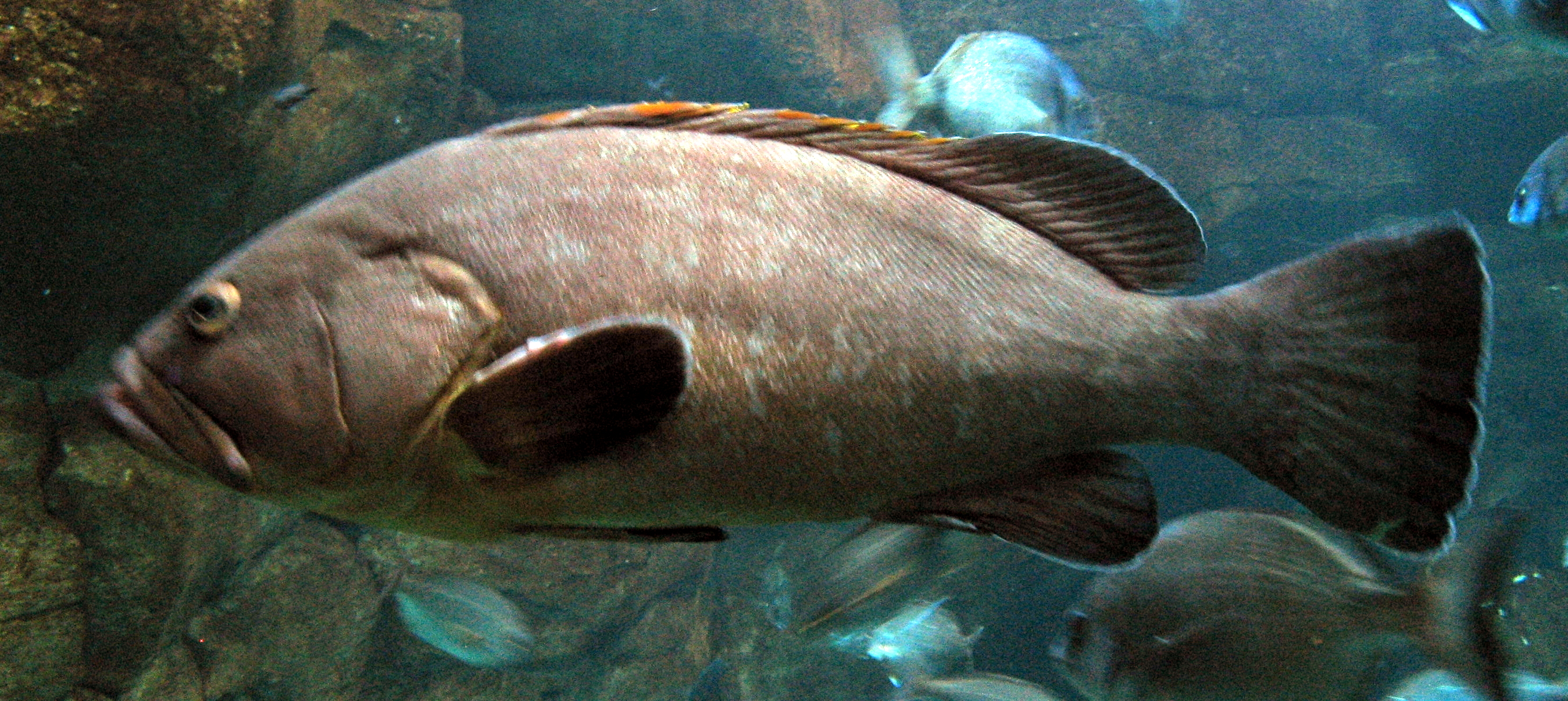 Epinephelus marginatus in Aquarium Cinéaqua Map: 48° 51' 44" N 2° 17' 27" E